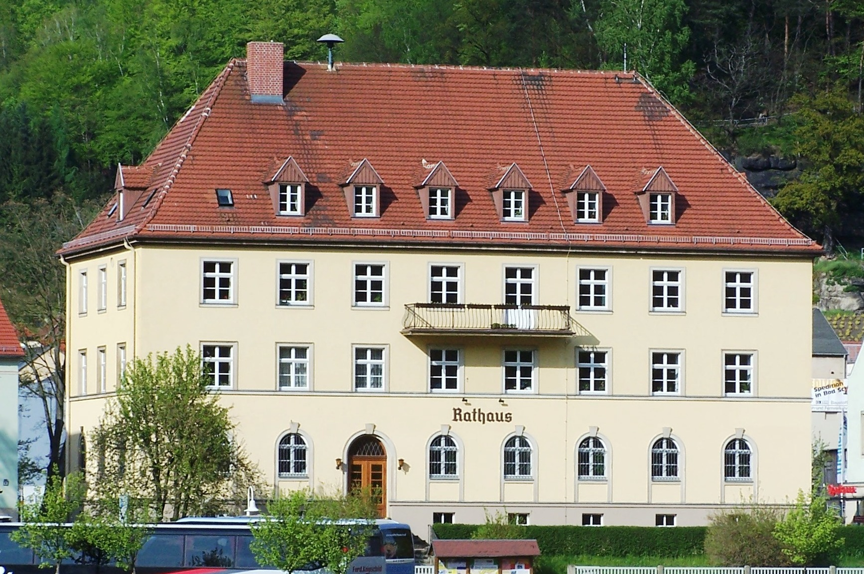 Rathaus in Bad Schandau, Sächsische Schweiz